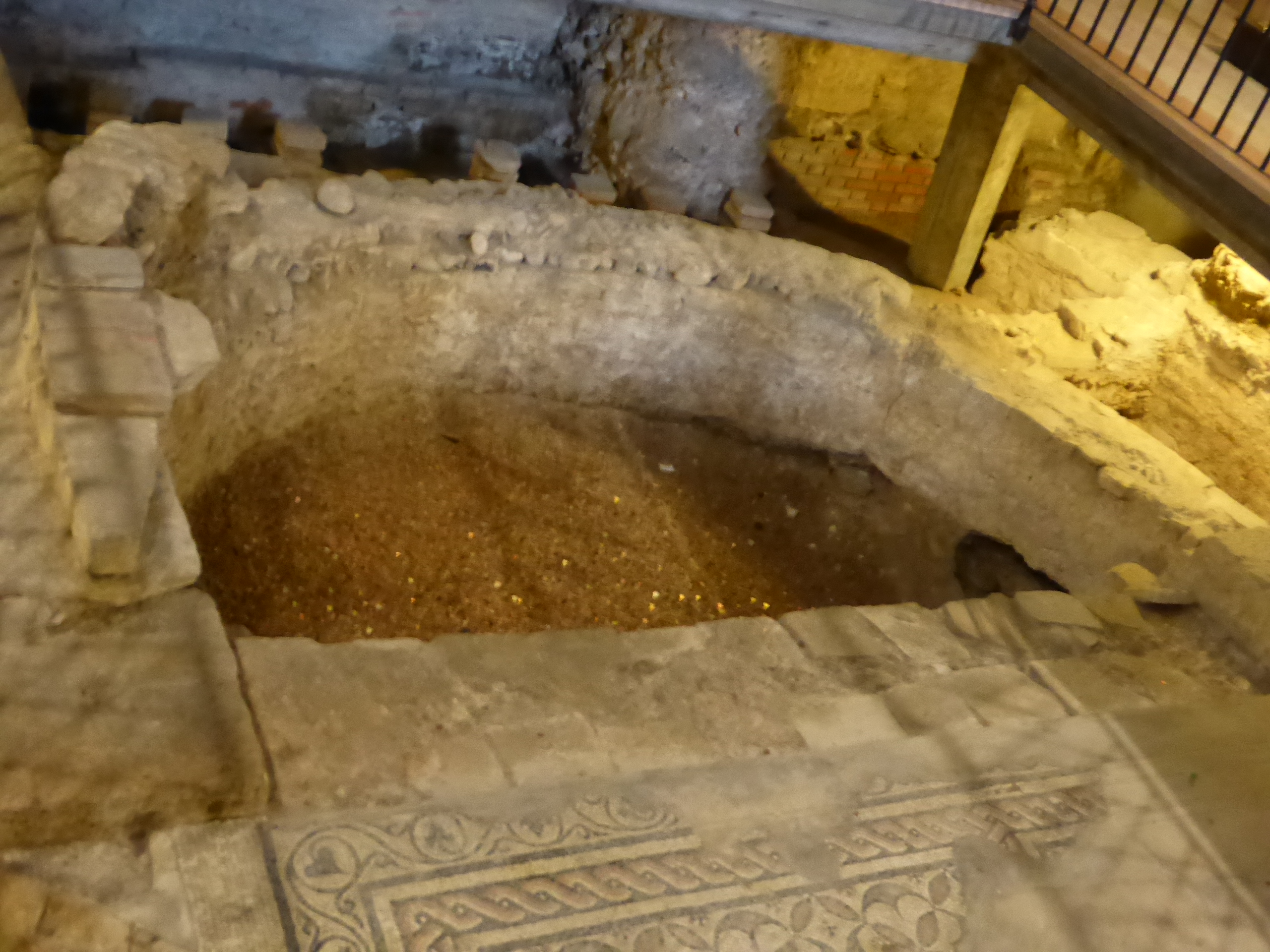 Ausgrabungen Domkomplex Verona